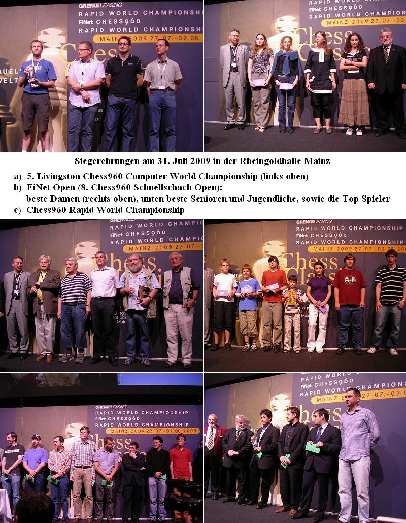 Chess Classic Mainz - Siegerehrungen am 31. Juli 2009 in der Rheingoldhalle Mainz: Chess960 Computer World Championship, FiNet Open Chess960 (beste Damen, Senioren, Jugendliche und Top Spieler) sowie Chess960 Rapid World Championship.